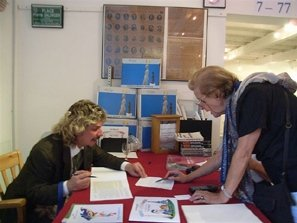 Alex Di Gregorio durante la presentazione del proprio libro "Pierre Salinger", ad Avignone nel 2007.